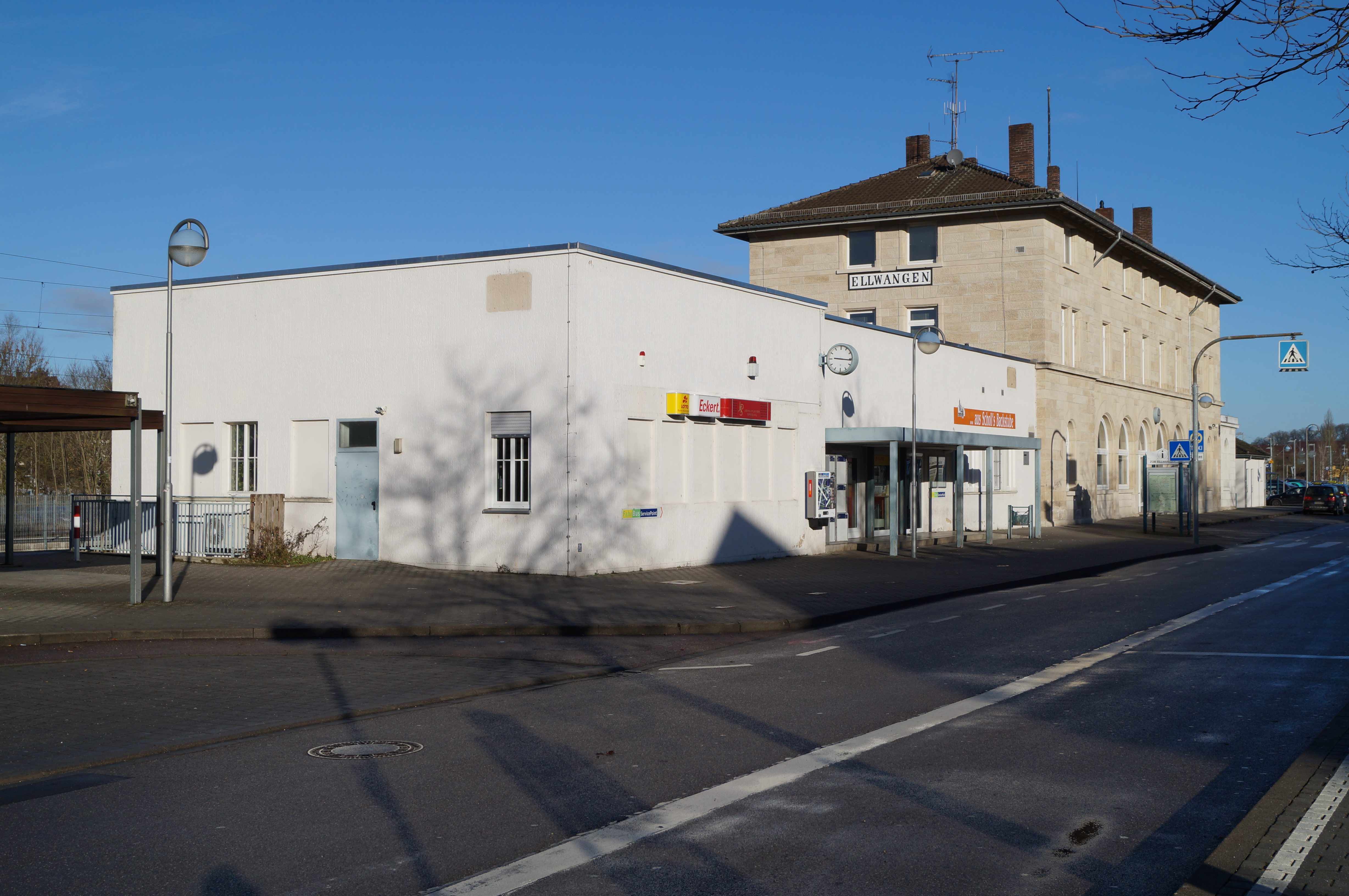 Das Empfangsgebäude des Bahnhofes Ellwangen vom ZOB aus gesehen.